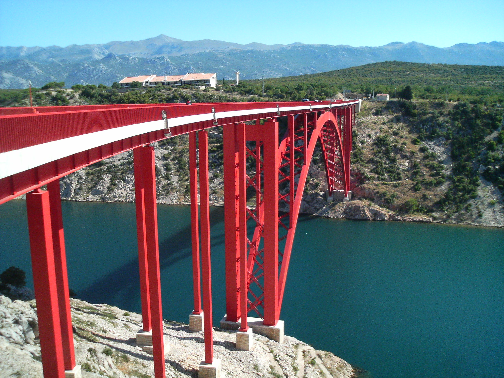 Maslenički most